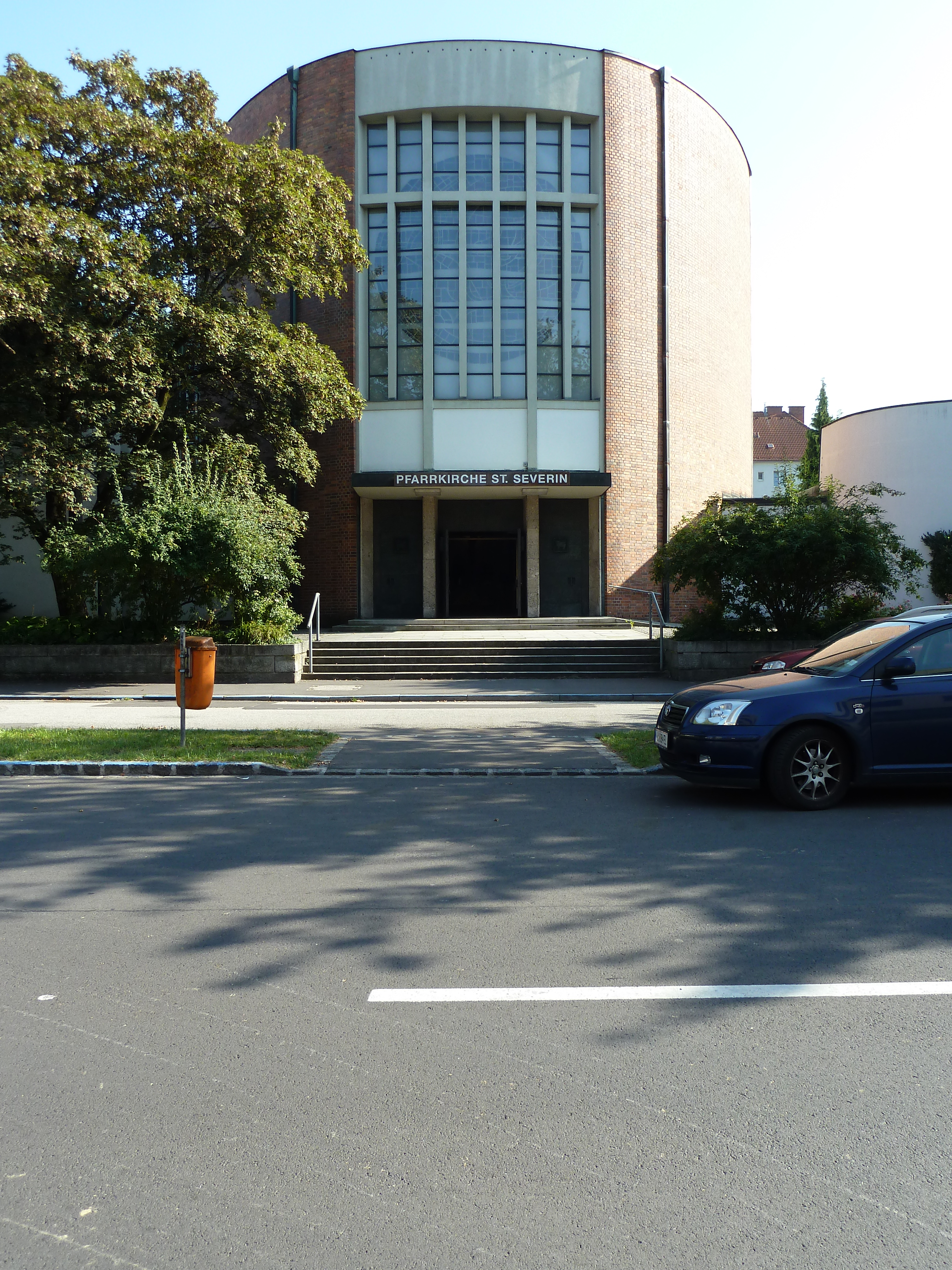 Kath. Pfarrkirche St. Severin